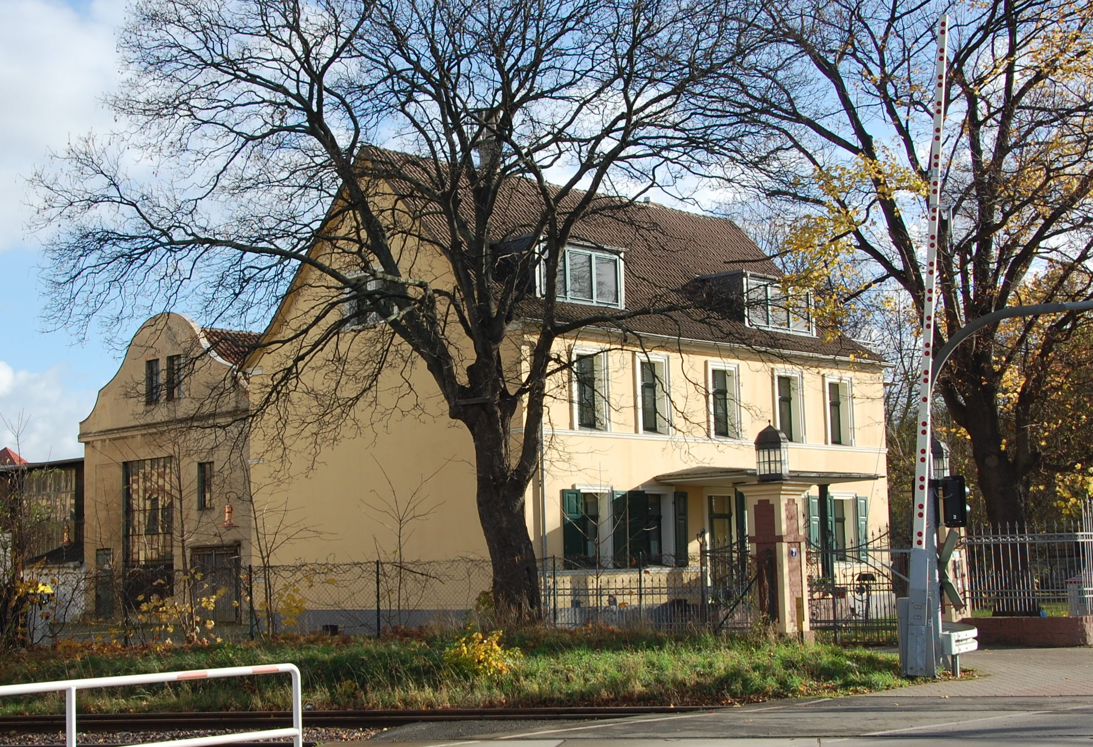 Haus Gernröder Weg 3 in Quedlinburg